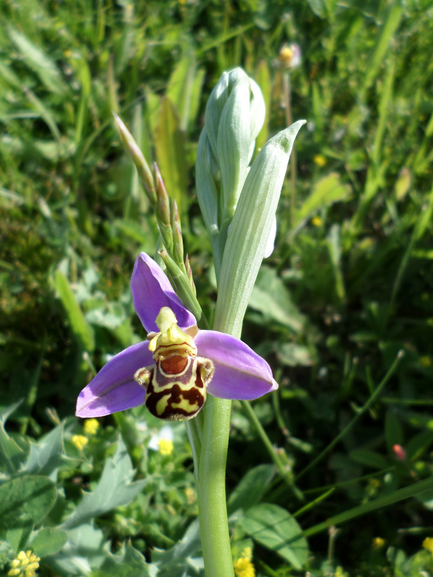 Ophrys abeille, environs de Blaye